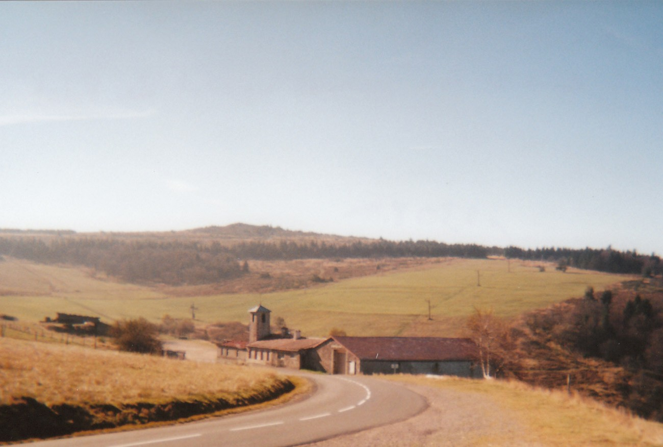 La jasserie et le crêt de la Perdrix plus haut